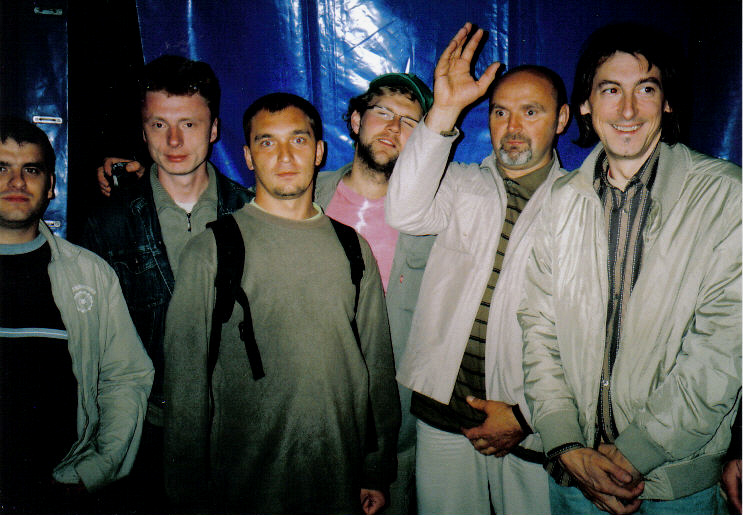 Leszcze (grupa muzyczna)